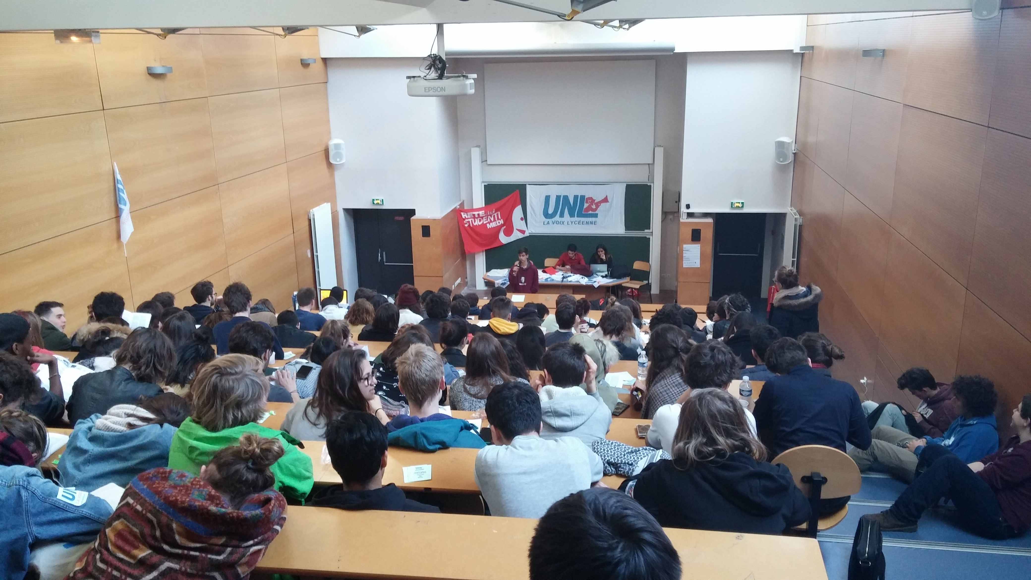 X Congresso dell'Union Nationale Lycéenne, accanto alla bandiera bianca dell'UNL la bandiera rossa della Rete degli Studenti Medi, presente al congresso con una delegazione dall'Italia. Parigi, 10 aprile 2016.